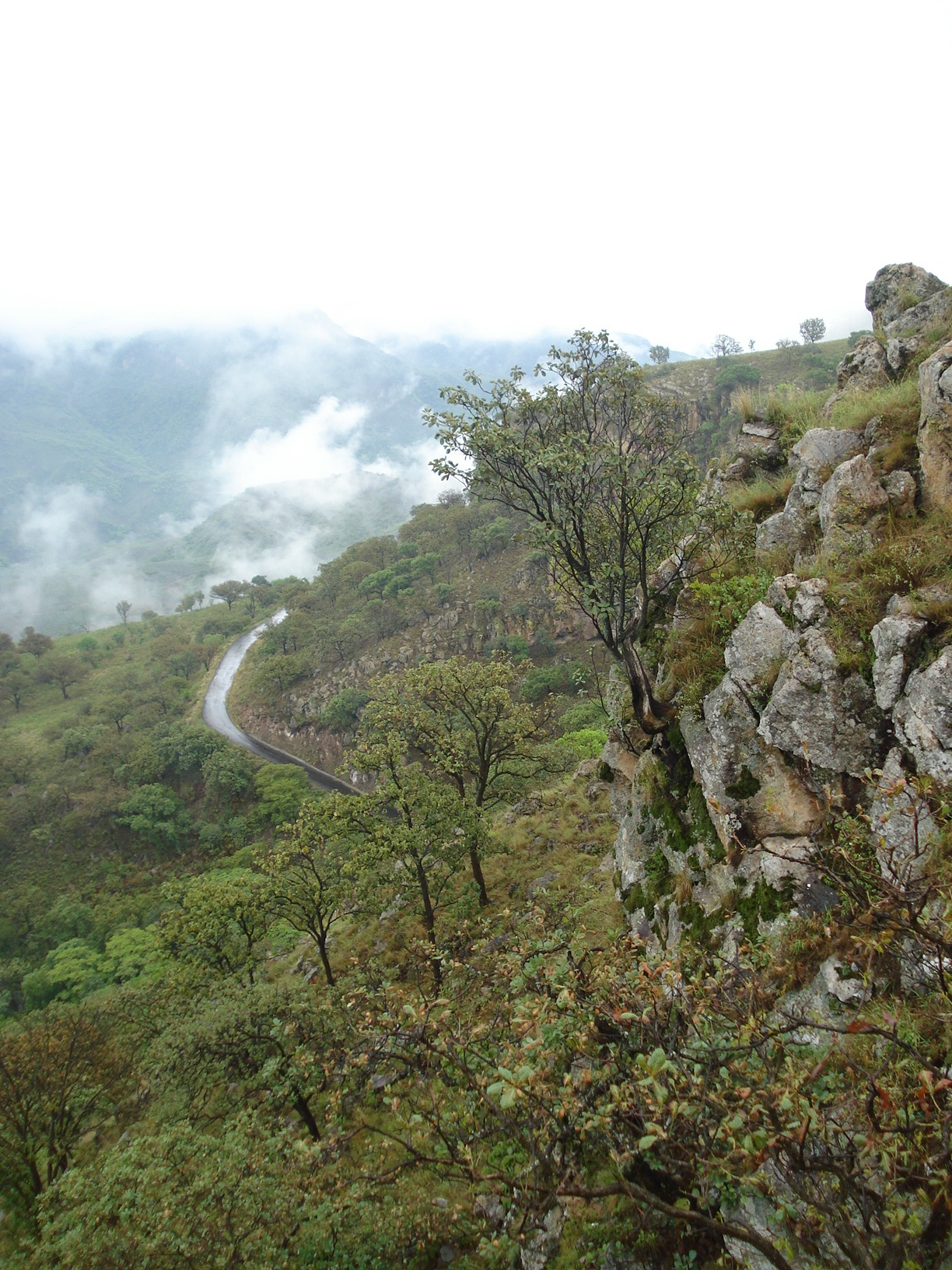 Muy cerca de Guadalajara se pueden apreciar estos hermosos paisajes.